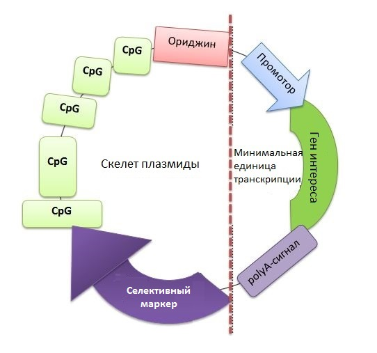 Структура ДНК вакцины, созданной на основе плазмидного вектора